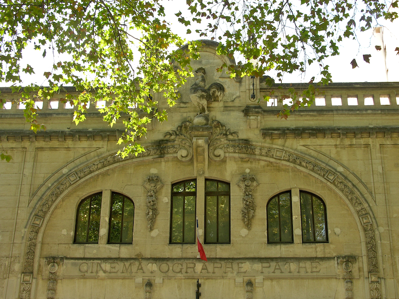 Le coq, symbole des cinémas Pathé. A Montpellier, boulevard Sarrail près du Musée Fabre. On lit l'inscription "Cinématographe Pathé".